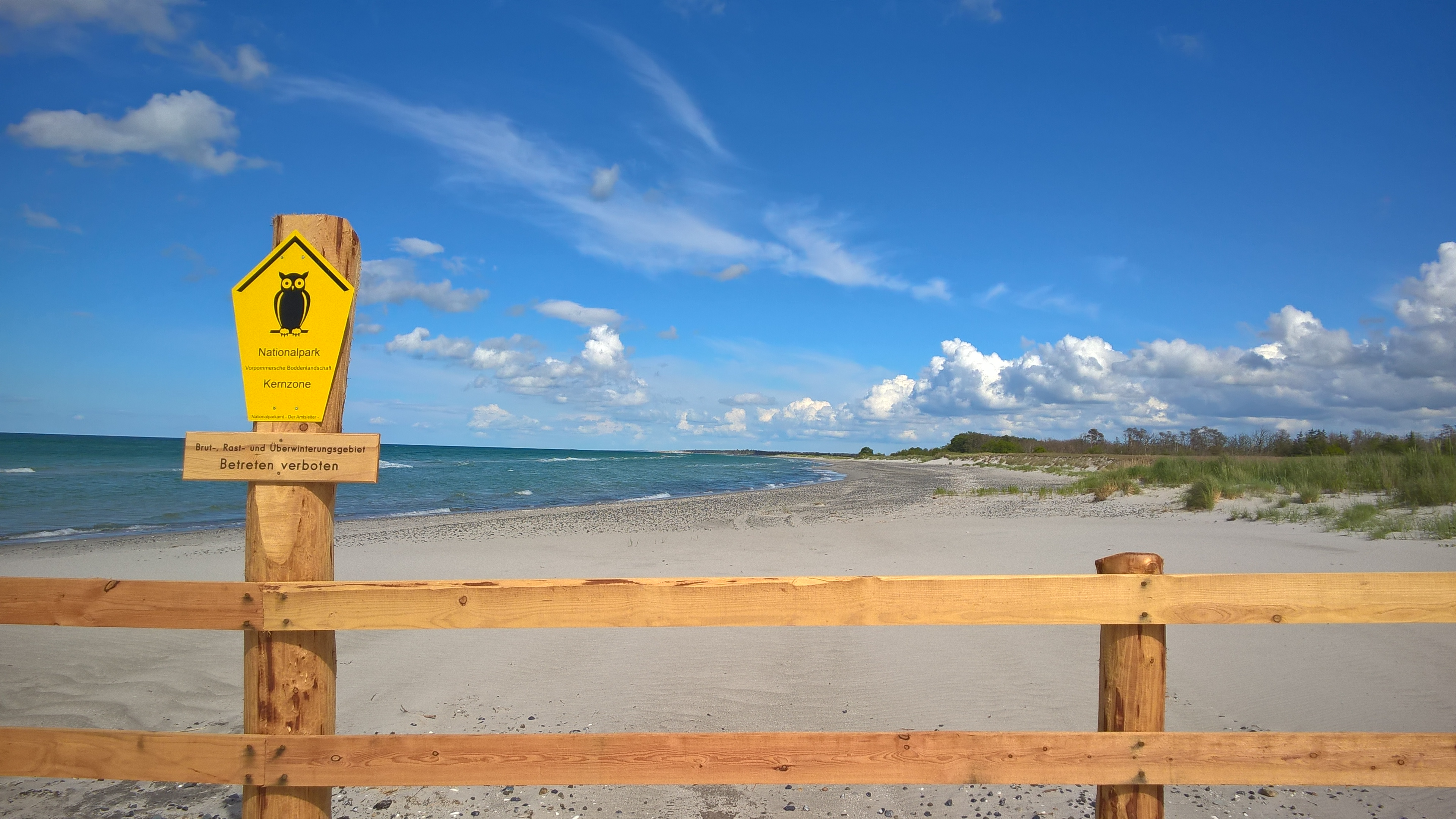 Nationalpark Vorpommersche Boddenlandschaft, Darß--Grenze zur Kernzone, Blick Richtung Pramort (1)